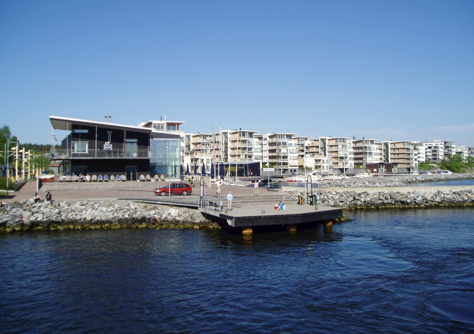 Gåshaga brygga, pier, Lidingö, Sweden